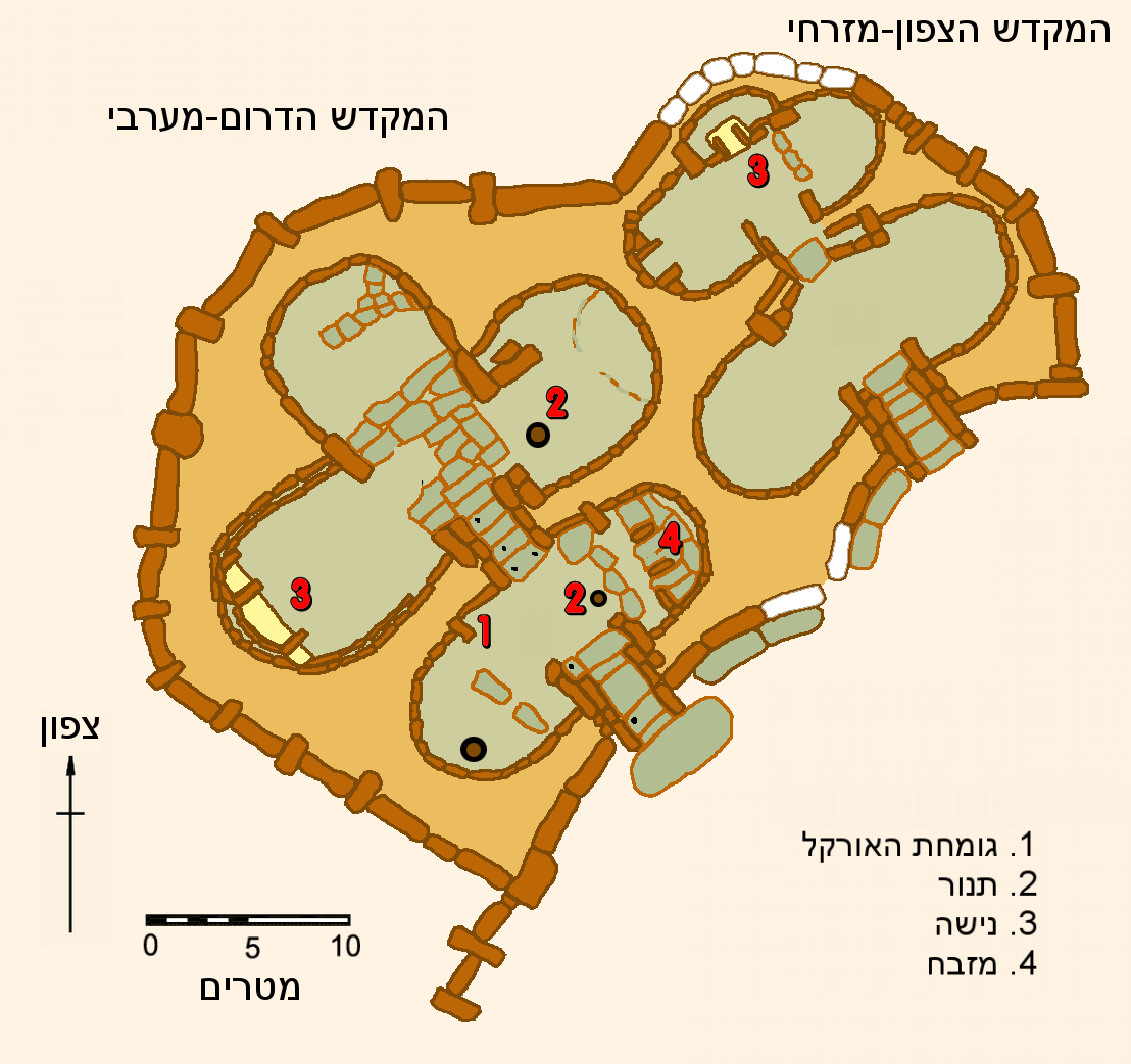 ג'גנטייה